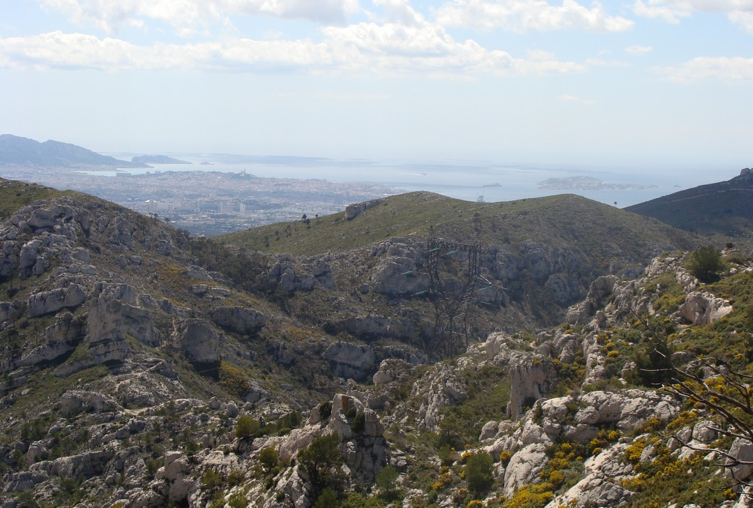 Vue du massif de l'Étoile, aux environs du col Sainte-Anne ; au loin, Marseille et la mer.